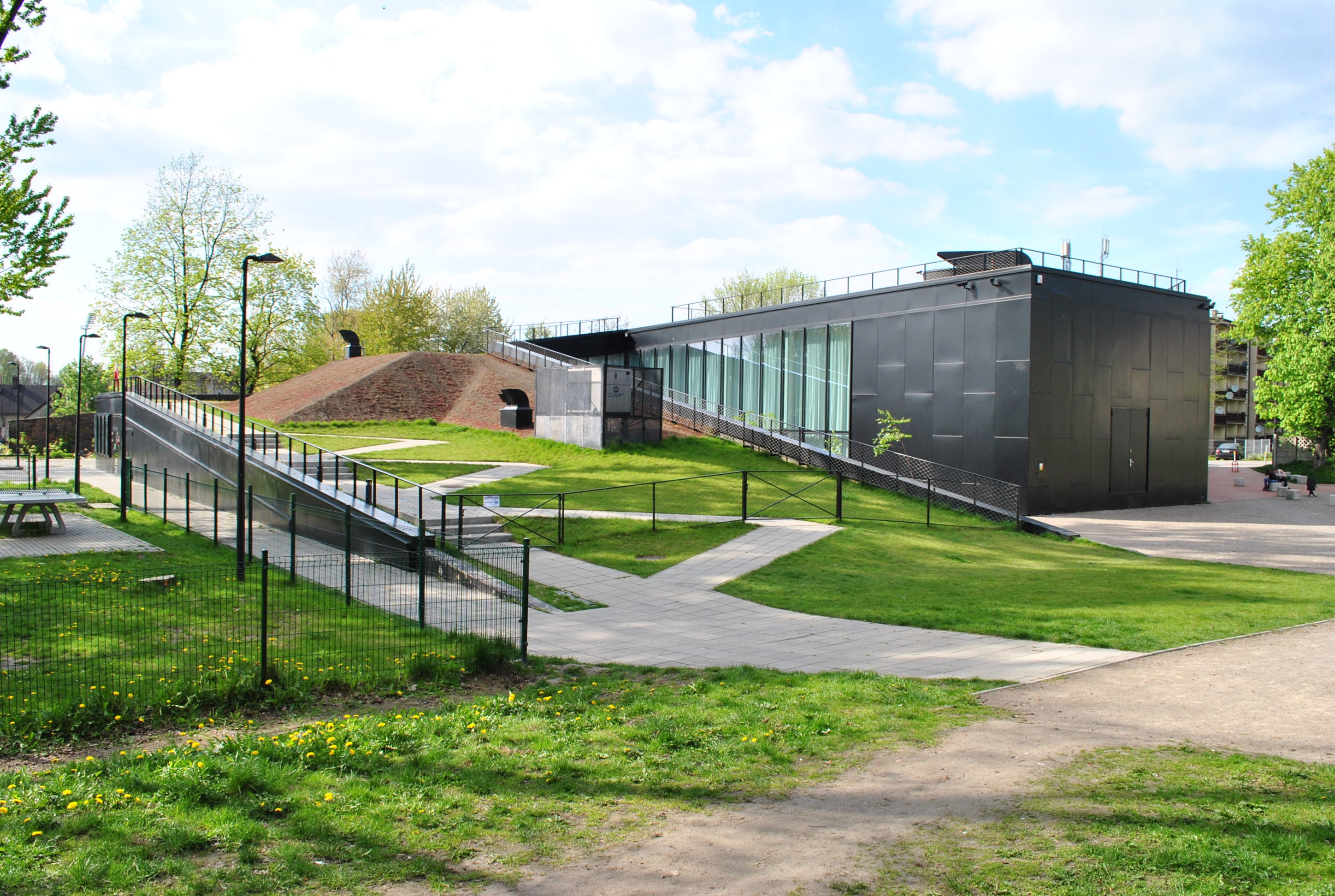 Katowice, Dąb. Filia Dąb Miejskiego Domu Kultury Koszutka